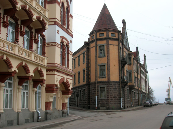 Embankment in Vyborg